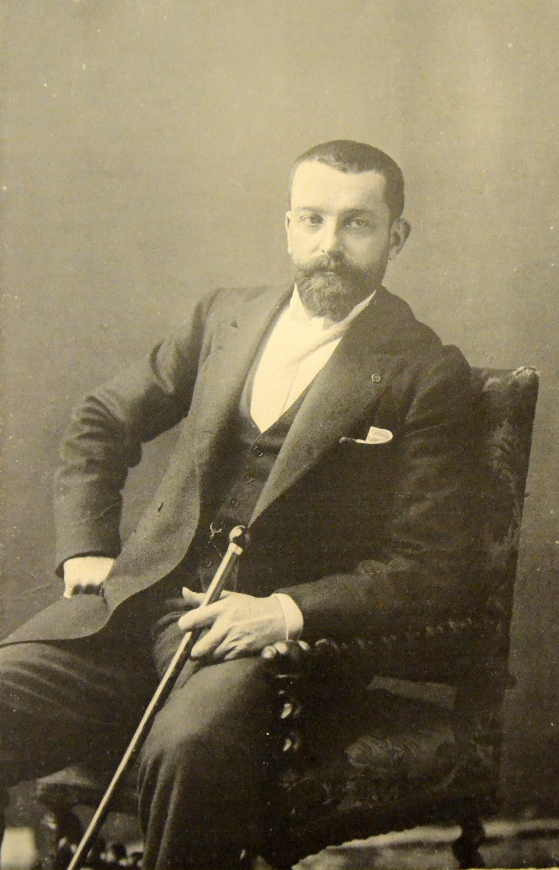 Photo légendée "Henri Gervex", dans un article de la "Revue illustrée" (Tome relié 1902) Portrait de Henri Gervex